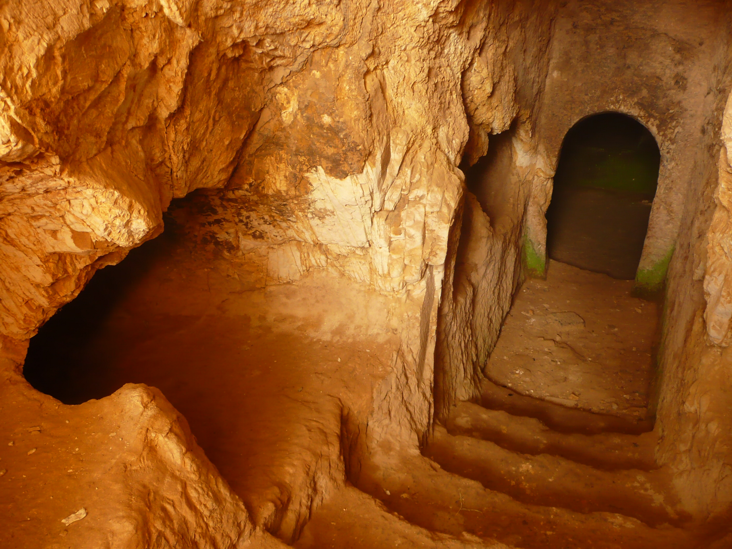 Escaleras de acceso a la tumba de Bazen, época aksumita, Aksum, Etiopía